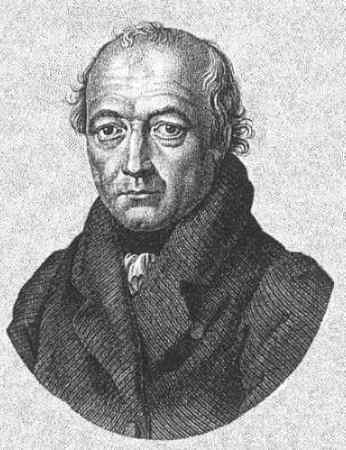 Martin Boos (* 25. Dezember 1762 in Huttenried [heute eine Gemarkung von Ingenried im Allgäu]; † 29. August 1825 in Sayn [heute ein Ortsteil von Bendorf bei Neuwied]) war ein römisch-katholischer Pfarrer, von 1817 bis 1819 Professor und Religionslehrer am Gymnasium Düsseldorf, Initiator und einer der Hauptvertreter der Allgäuer Erweckungsbewegung.